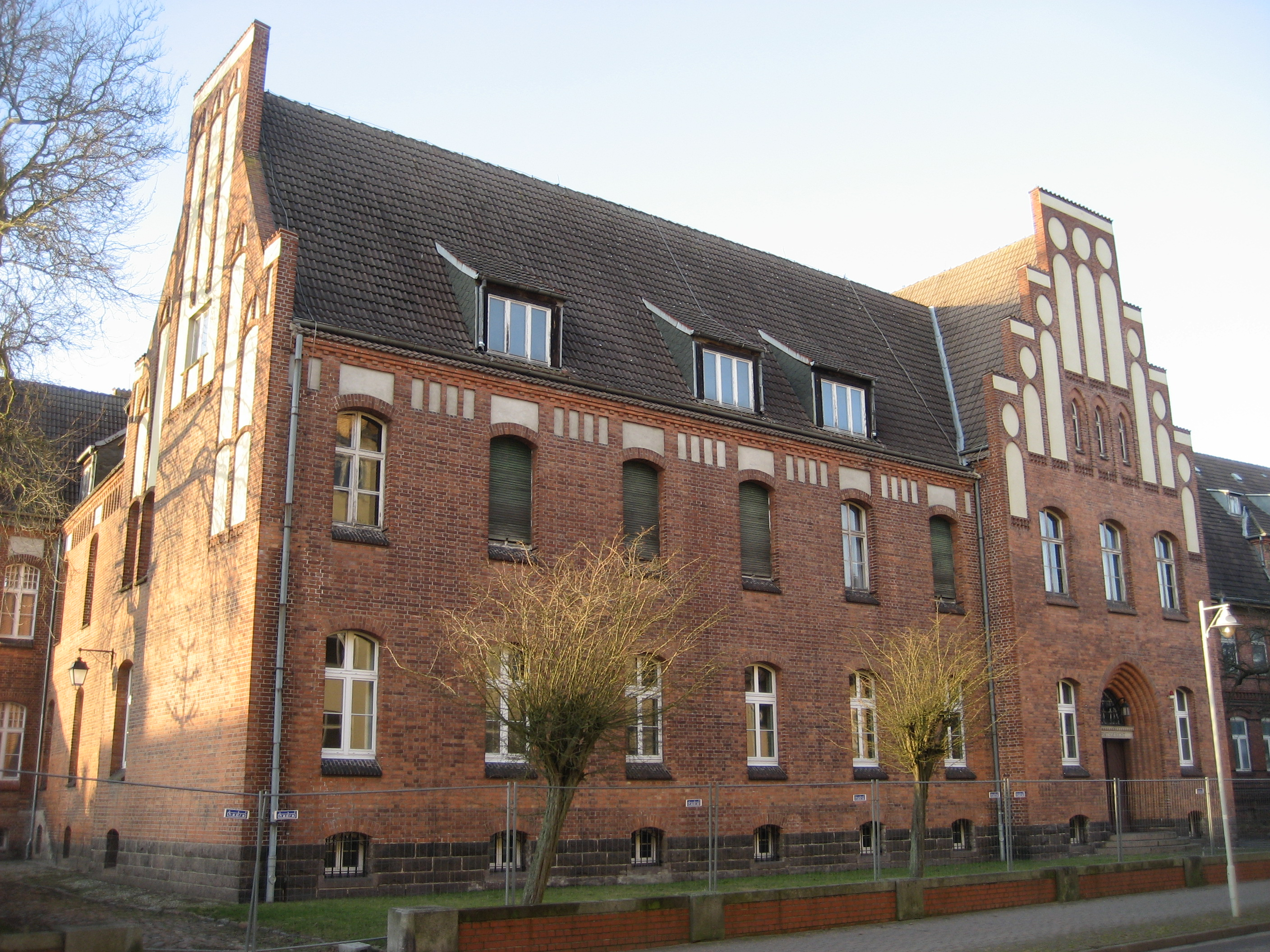 Das Amtsgericht Ueckermünde in der Gerichtsstraße 16.